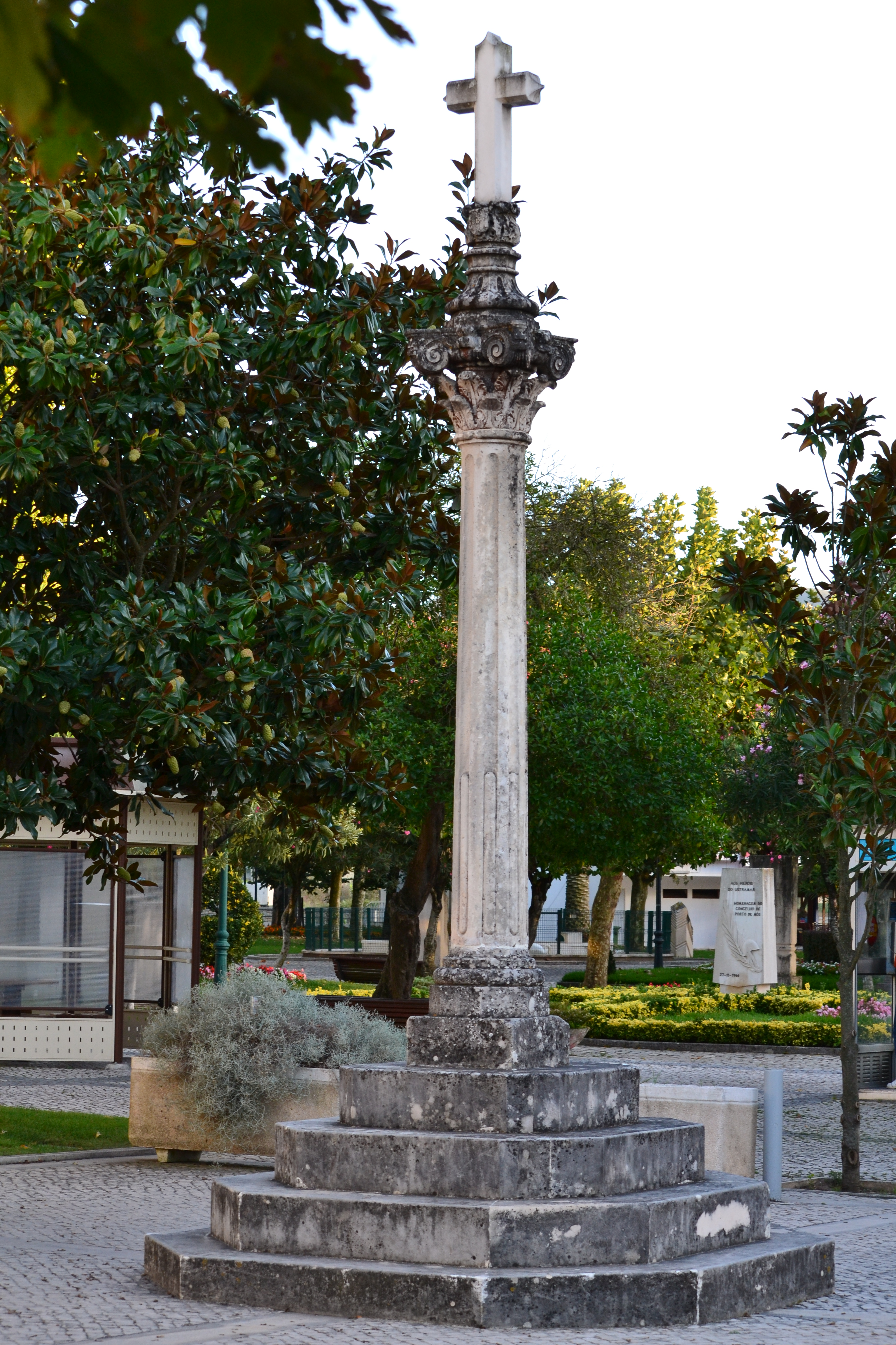 Pelourinho de Porto de Mós vista para o jardim This file was uploaded for Wiki Loves Monuments in Portugal with the unique identifier 72899.